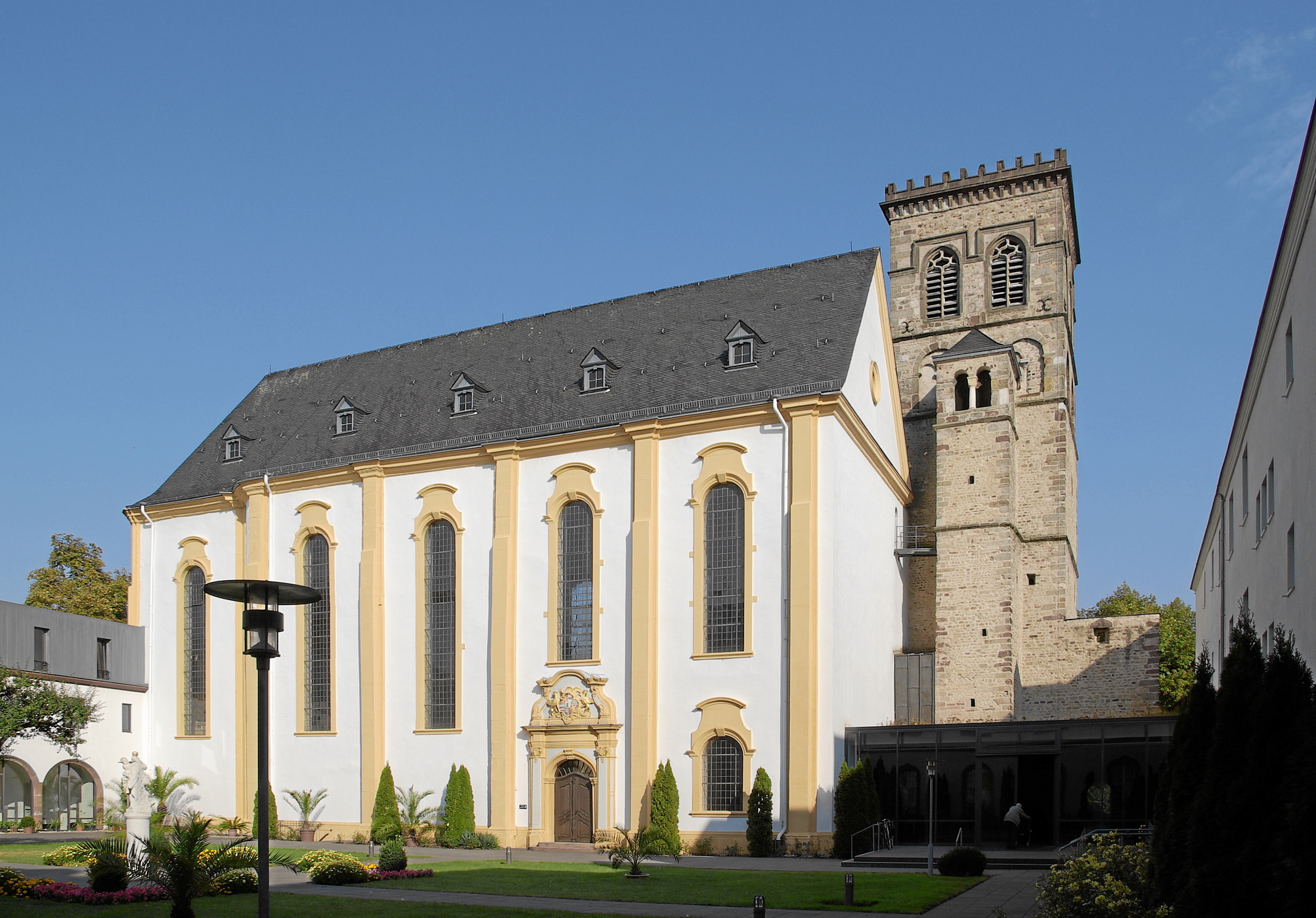 Trier, ehem. Benediktinnerinnenkloster St. Irminen, heute Vereinigte Hospitien, frühromanischer Turm der ehem. Klosterkirche, oberstes Freigeschoß um 1615, Turmabschluß 1836, ehem. Rokoko Saalbau, 1771 vollendet, Architekt Jean Antoine.